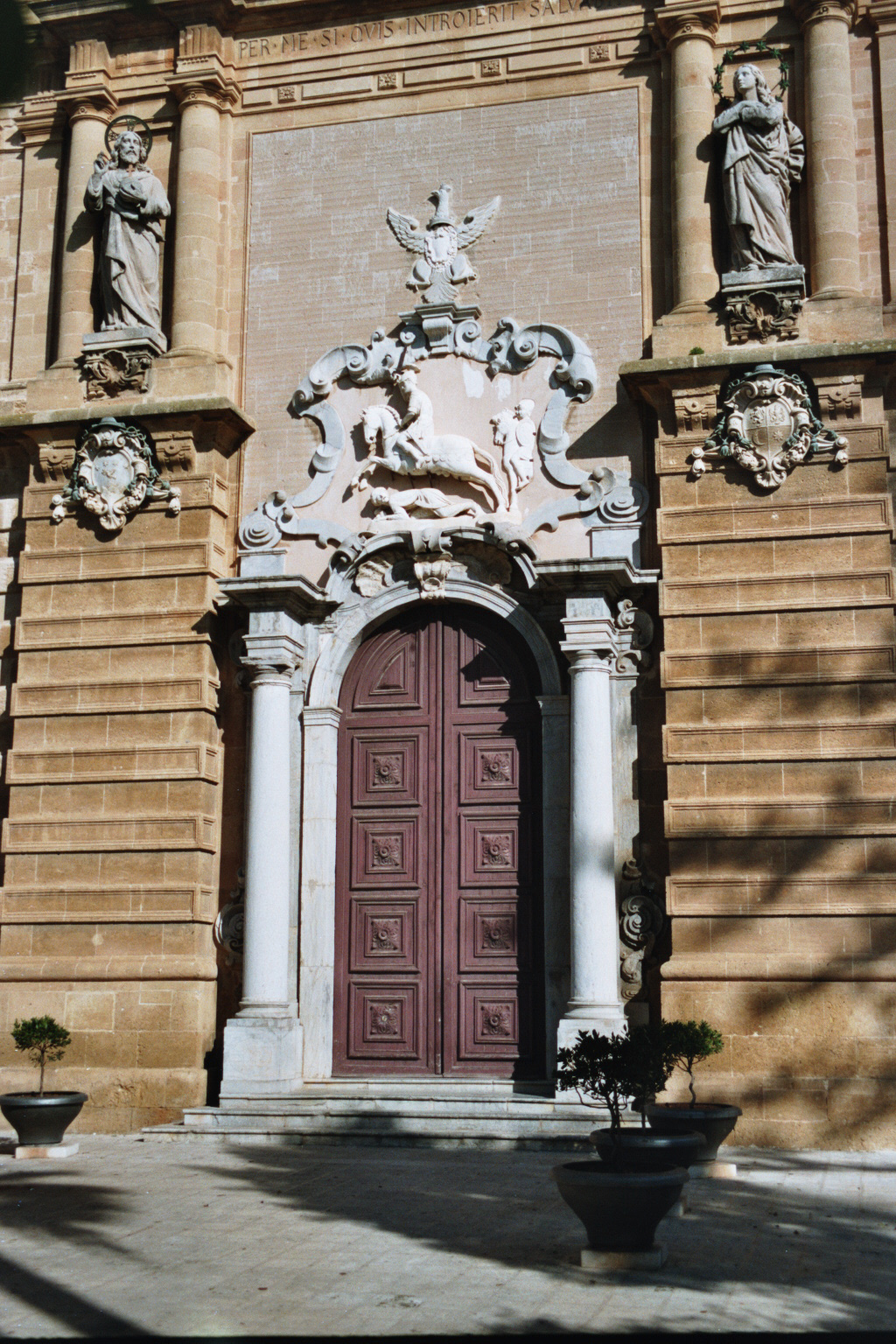 Cattedrale di Mazara del Vallo